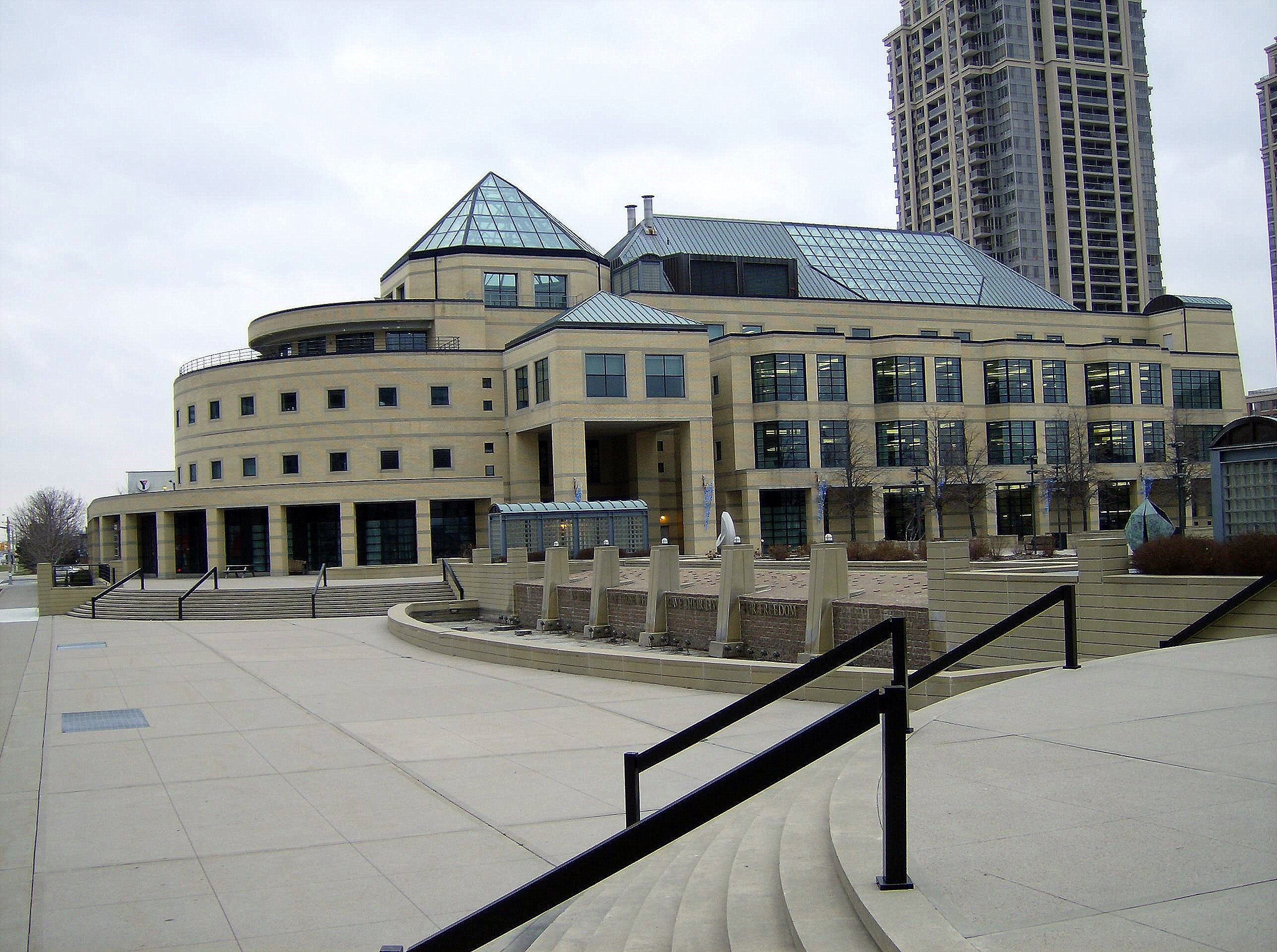 MississaugaCentralLibraryandcivicplaza.jpg